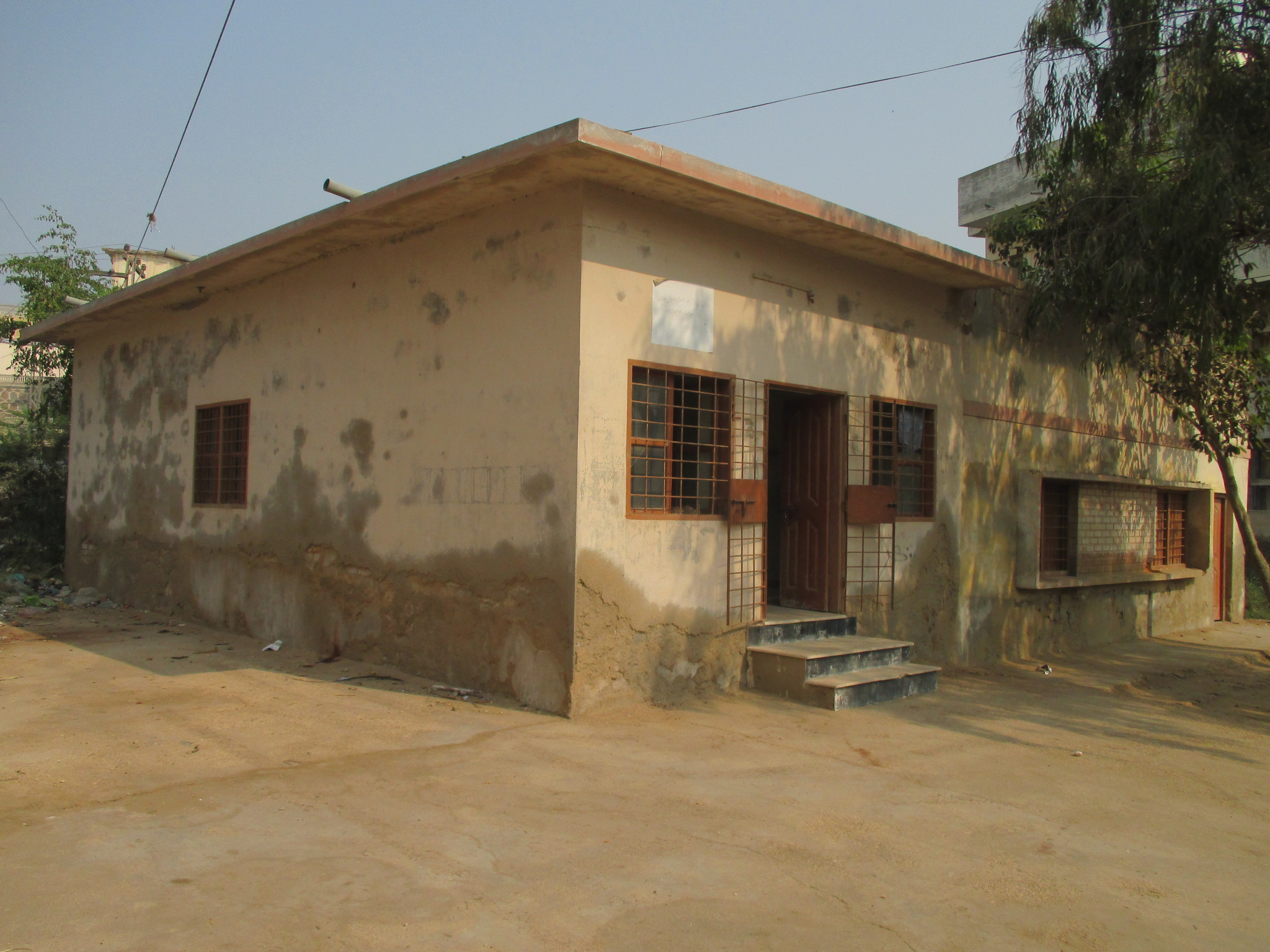 Post Office Sujawal 73050 Pakistan